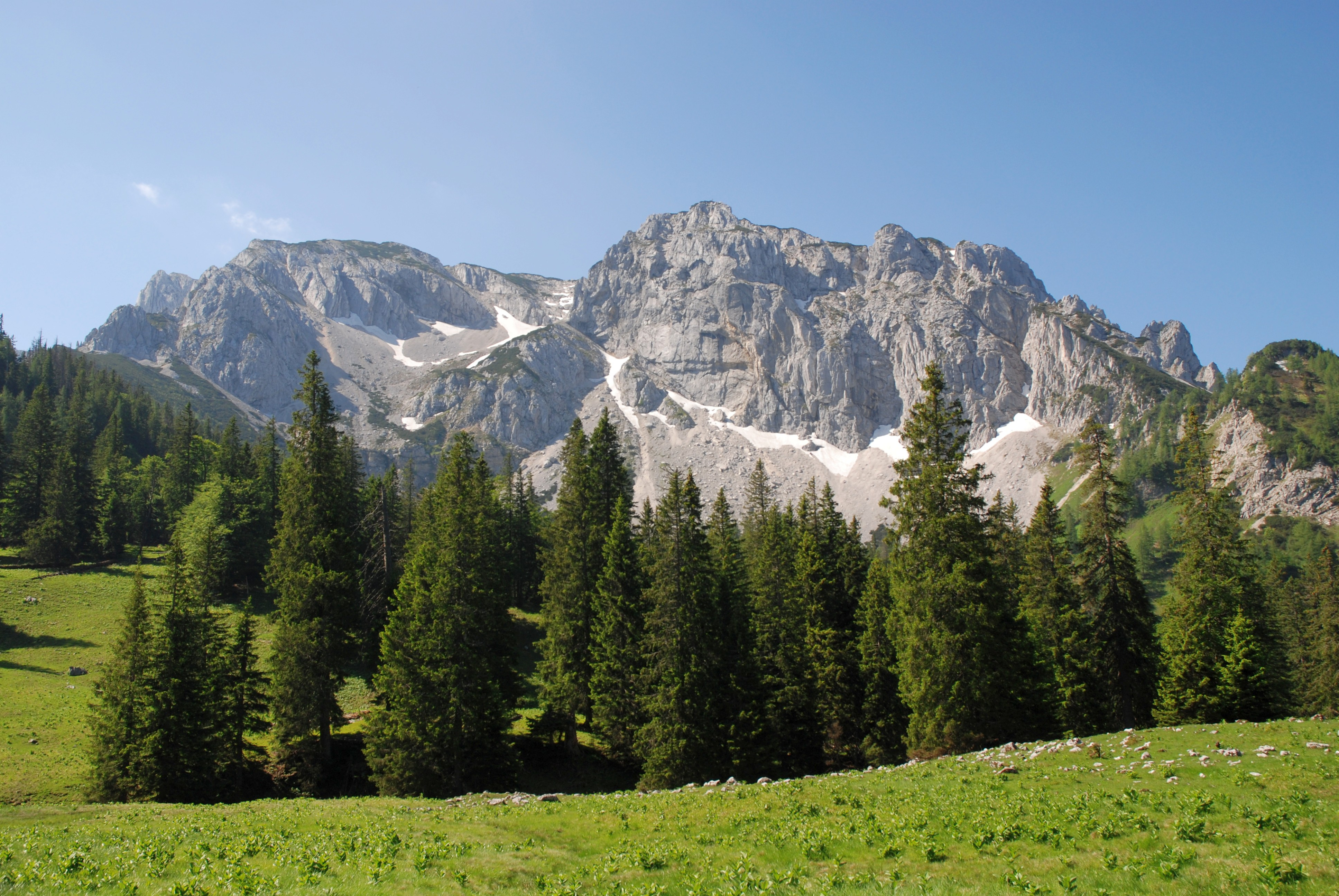 Nordseite des Hohen Nock und Seehagelmauer, Nationalpark Kalkalpen This file shows the National Park Kalkalpen in Austria.